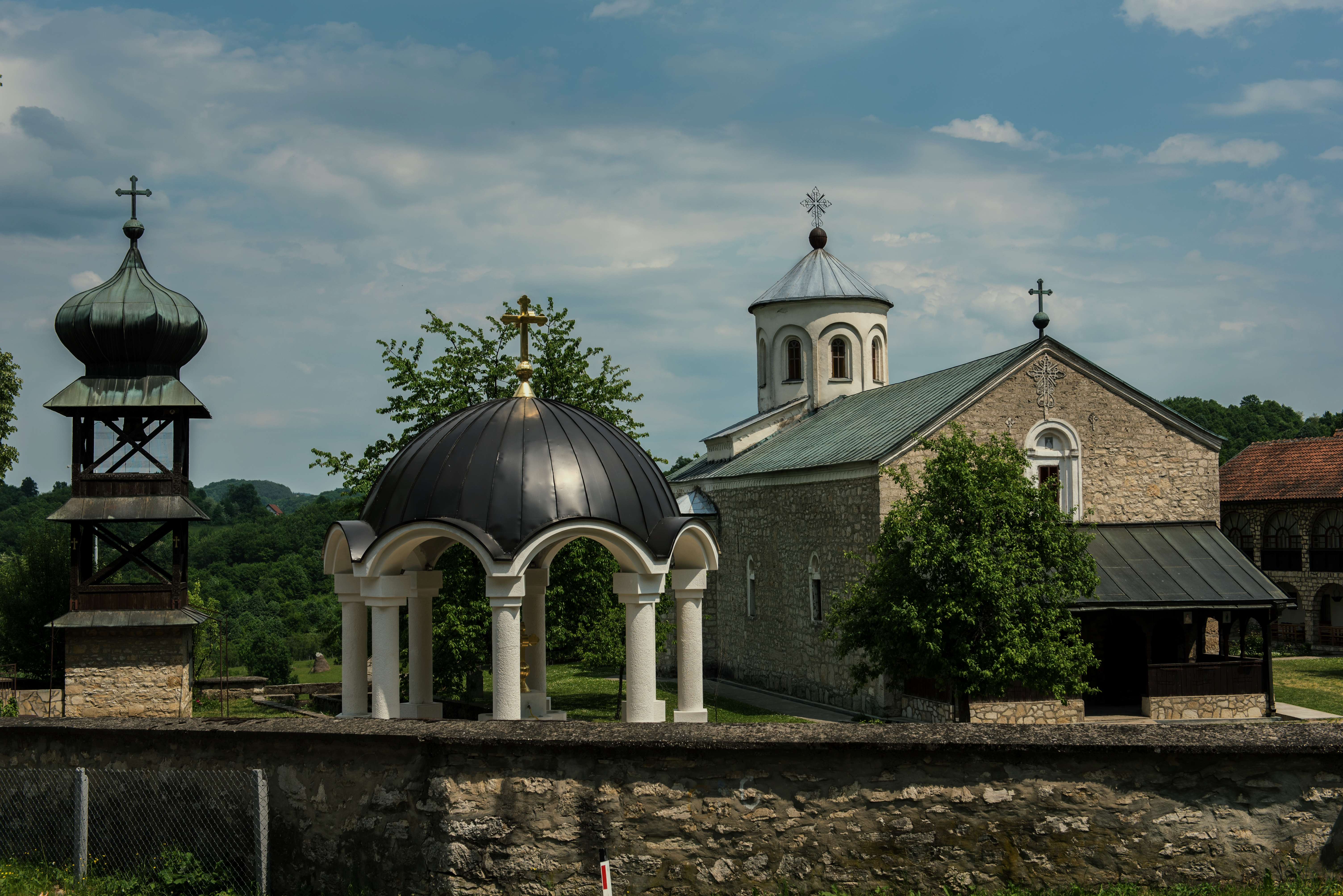 This image was uploaded as part of Trace of Soul 2016.